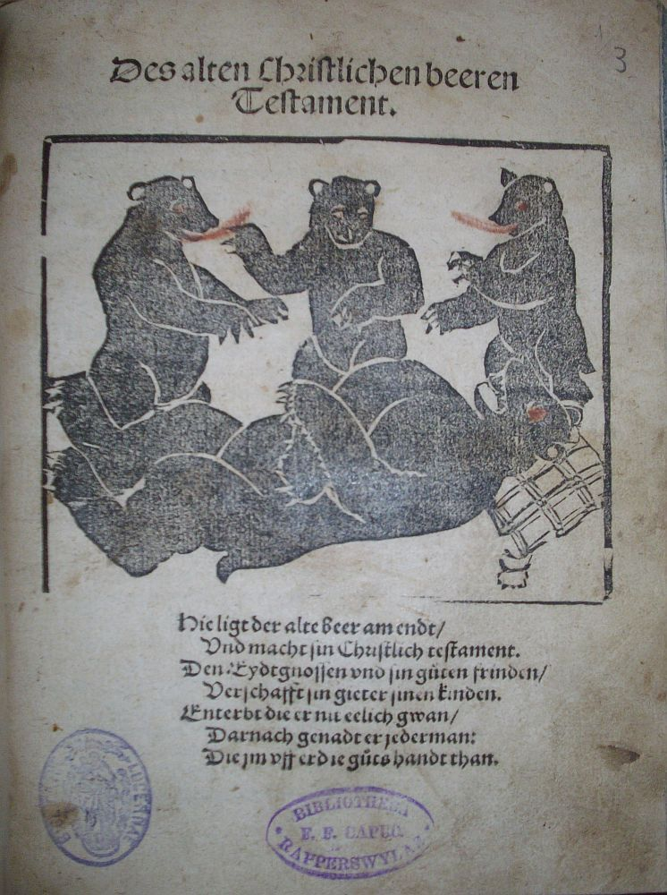 Titelblatt: Thomas Murner: Des alten Christlichen beeren Testament, Luzern 1528